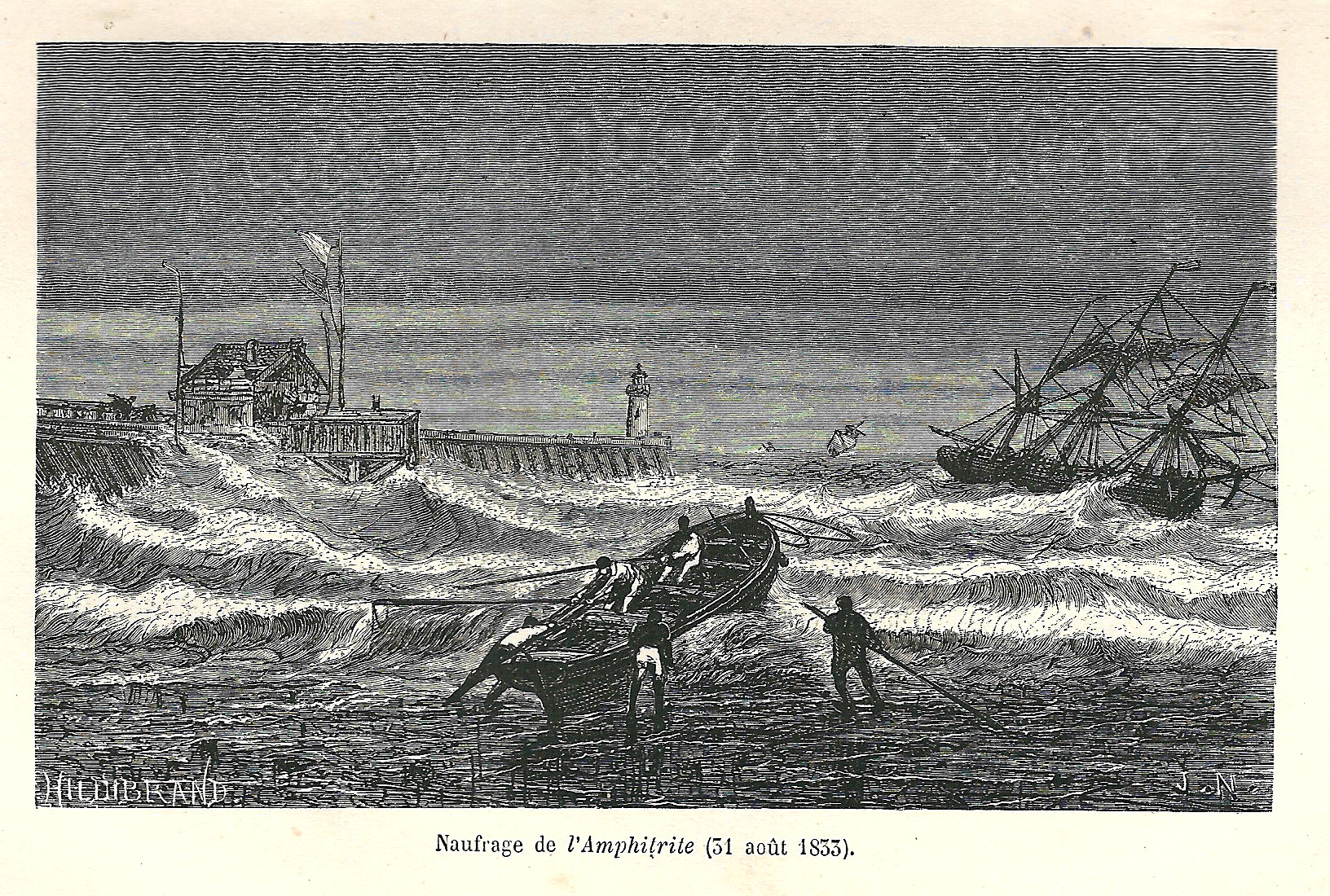 Gravure de Jules Noël tirée de : Zurcher & Margollé, Les Naufrages célèbres, Paris : Hachette, 3e édition, 1877. L'Amphitrite (1804) est bateau britannique de 200 tonnes, naufragé le 31 août 1833 sur la côte de Boulogne-sur-Mer en transportant 108 condamnées à la déportation en Australie, 12 enfants et 13 hommes d'équipage (133 morts, 3 survivants)